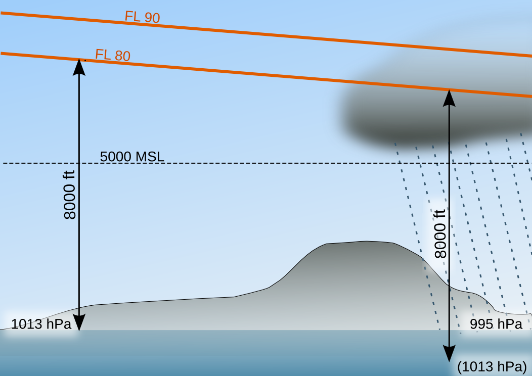 Flugflächen (schematisch)